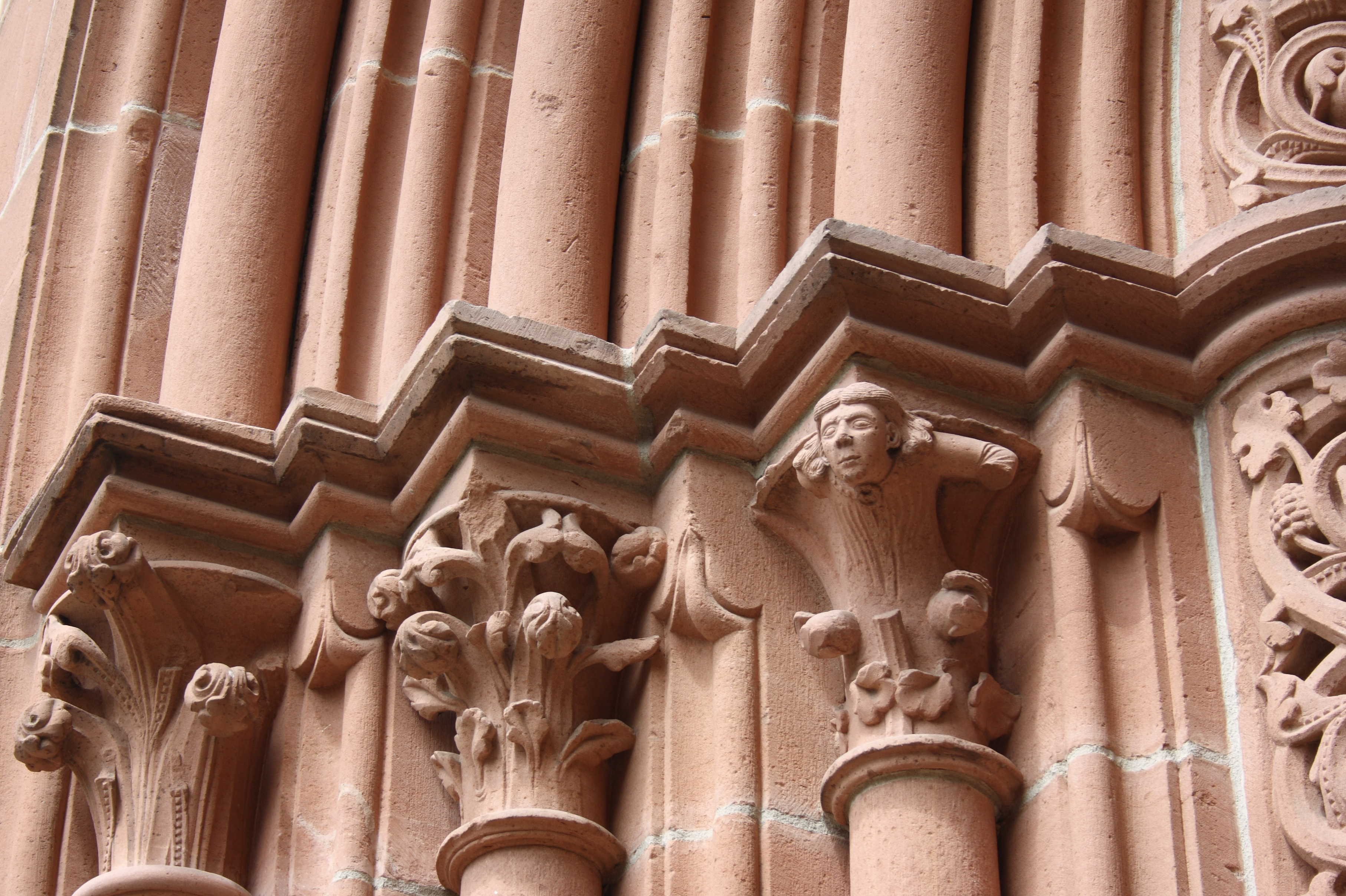 Portal des südlichen Querhauses der Marienkirche in Gelnhausen im Main-Kinzig-Kreis (Hessen), Knospenkapitelle am Portal